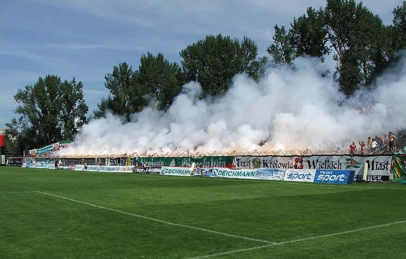 Oprawa kibiców Śląska Wrocław z użyciem tzw. Ogni Wrocławskich